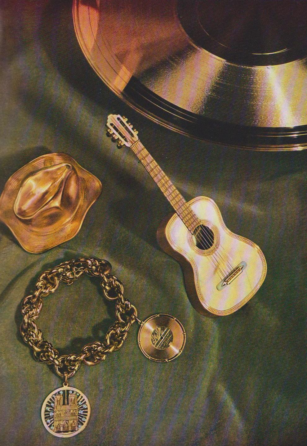 Représentation de la guitare d'or remise par la société Pathé-Marconi à Tino Rossi pour la vente de ses 10 millions de disques en 1956